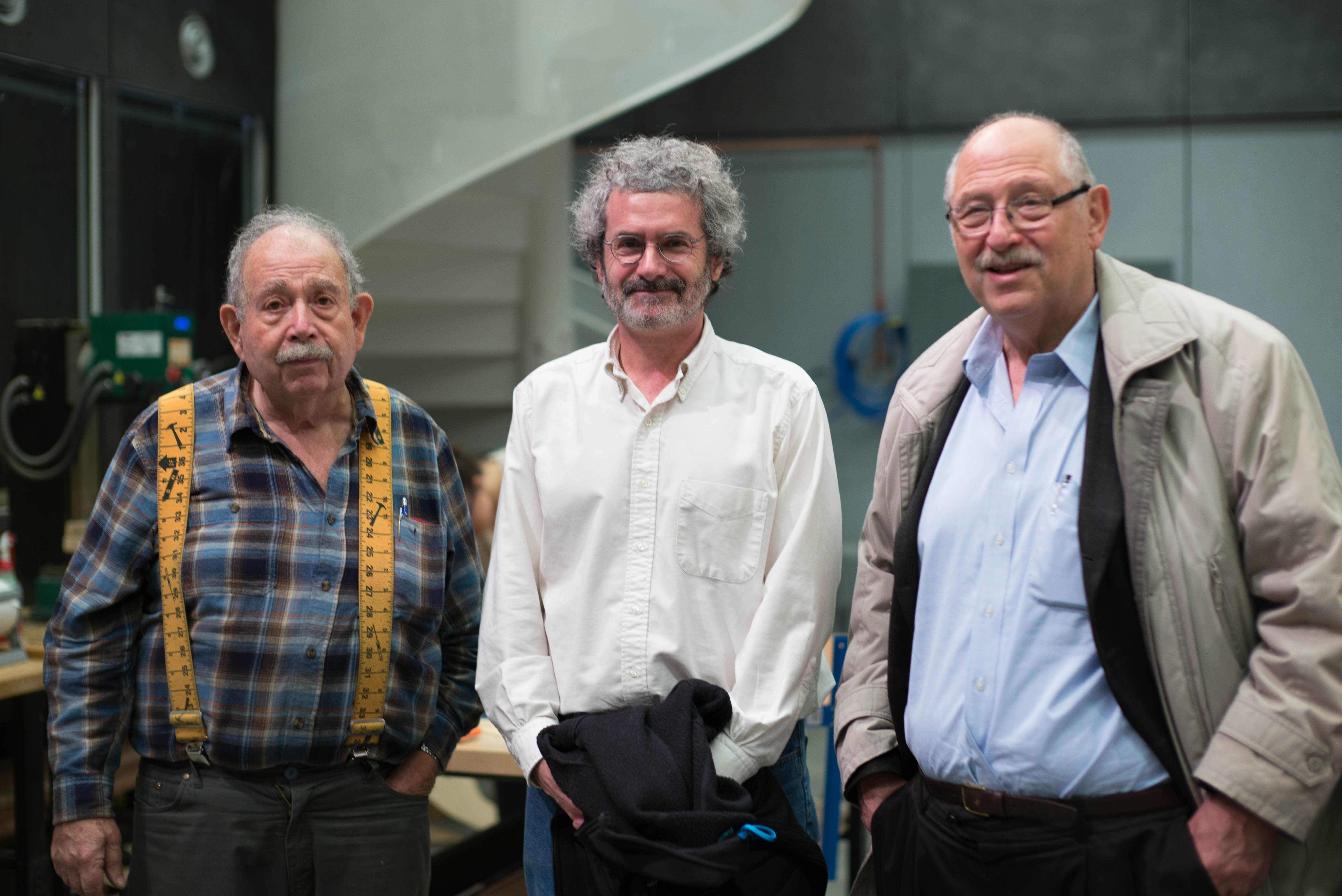 Didi Vardi, Neil Gershenfeld, Yossi Vardi